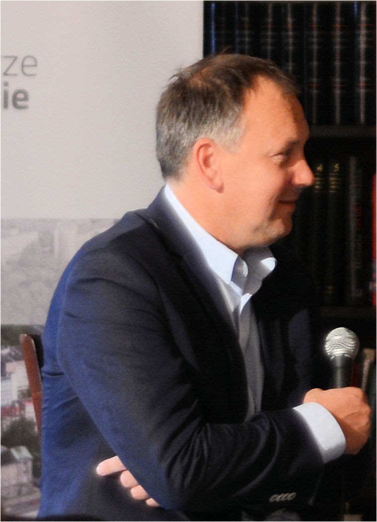 Cezary Łazarewicz, dziennikarz.